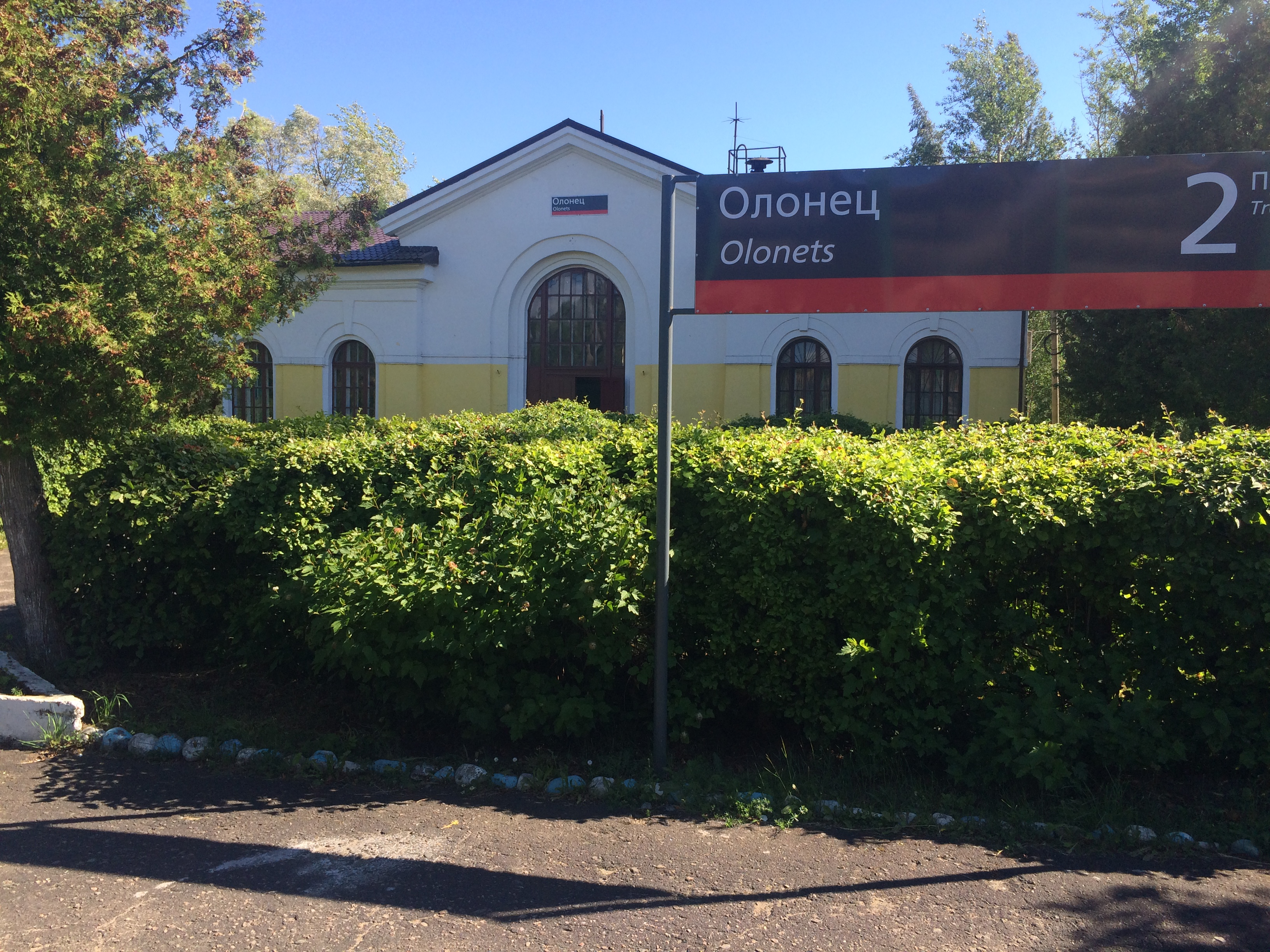 ст. Олонец